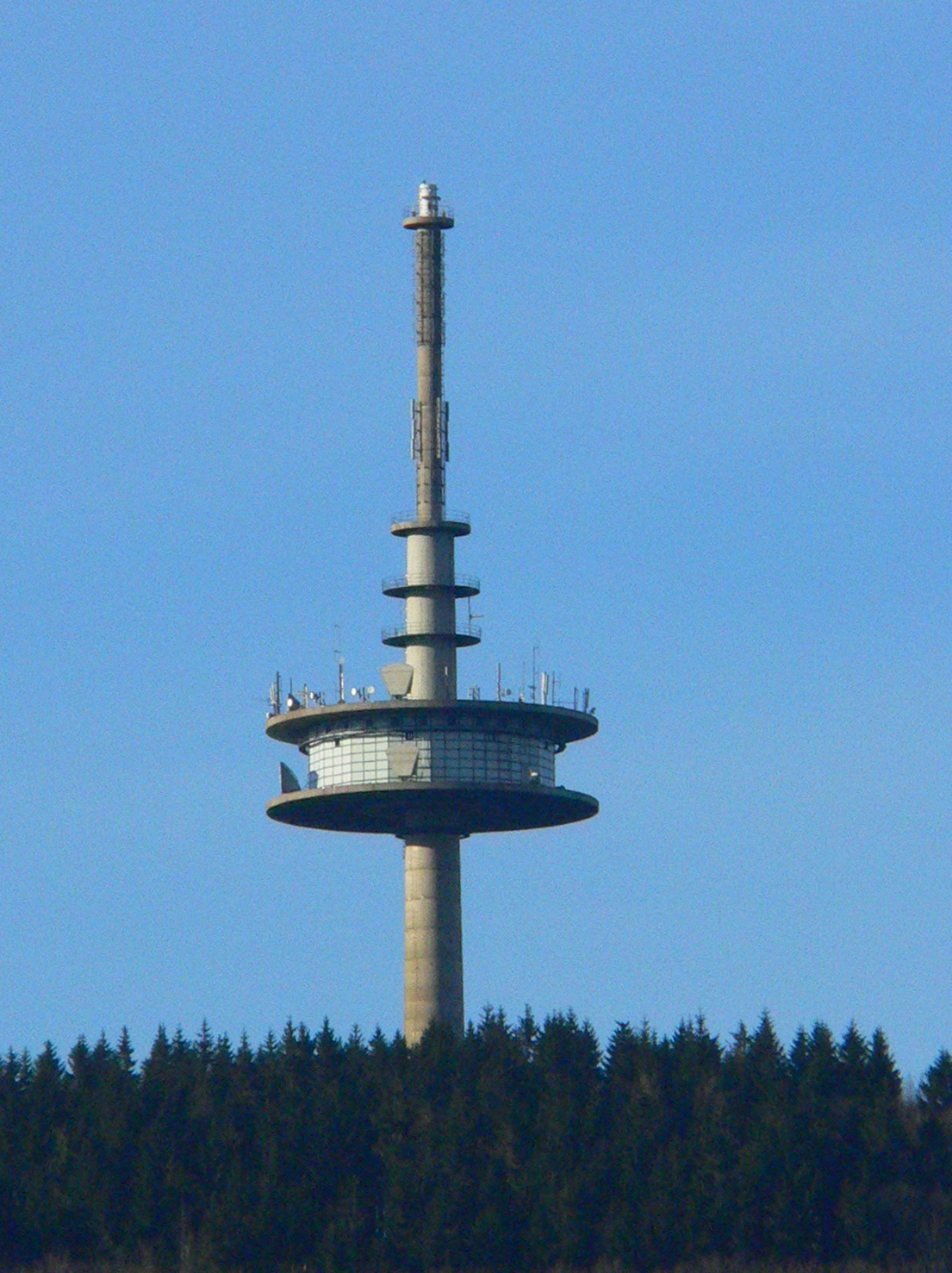 Kellerwald (Hessen), Fernmeldeturm auf dem "Hohen Lohr"